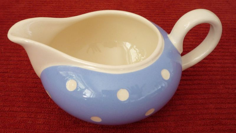 Milchkännchen von "Villeroy & Boch", Dekor "Doris", ca. 1930er Jahre